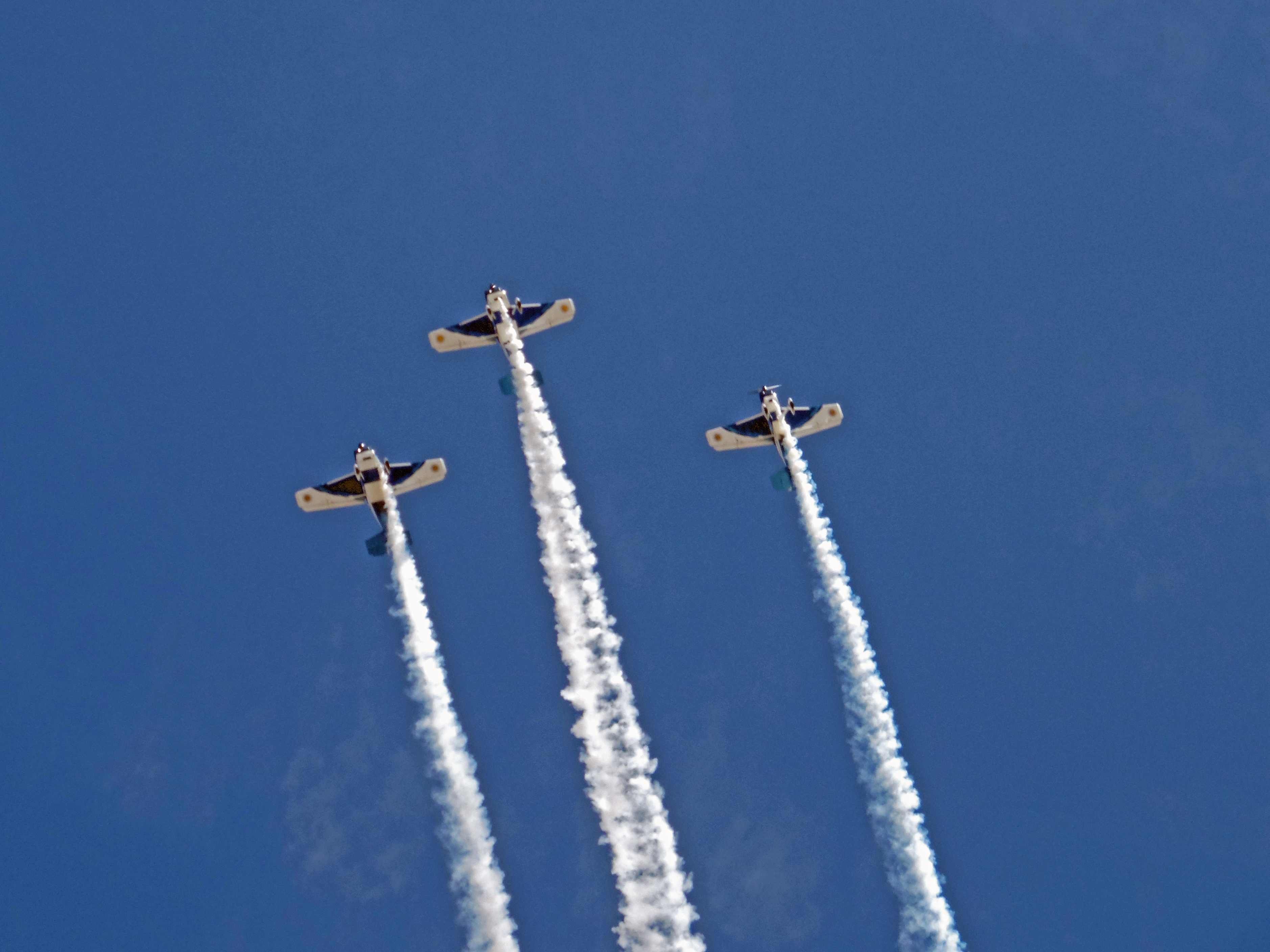 Escuadrilla acrobática argentina "Hangar del Cielo" en FIDAE 2014